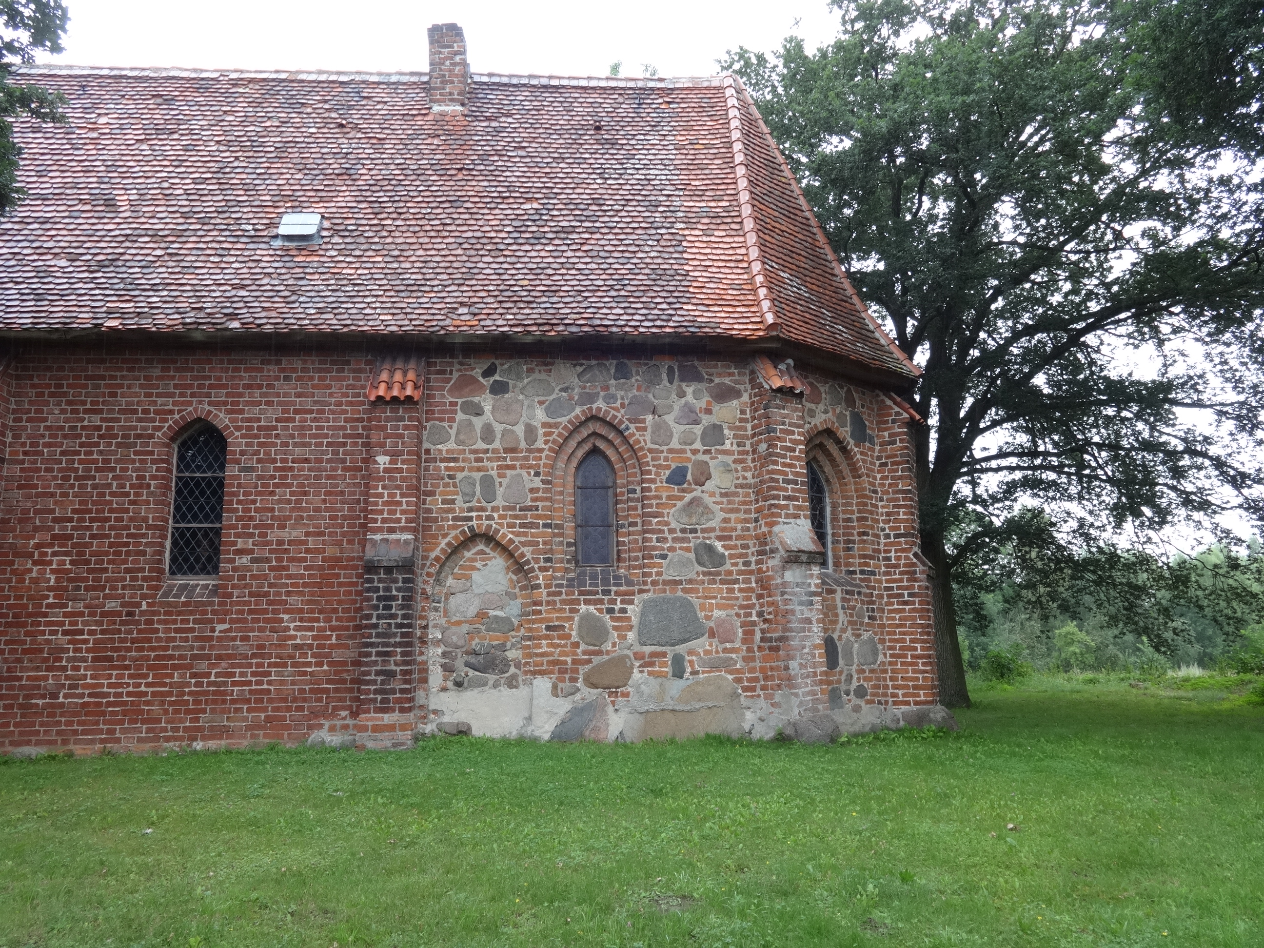 Die Dorfkirche Schönfeld ist eine Backsteinkirche aus der Zeit um 1400. In seinem Innern befindet sich unter anderem eine Kanzel aus dem 17. Jahrhundert.